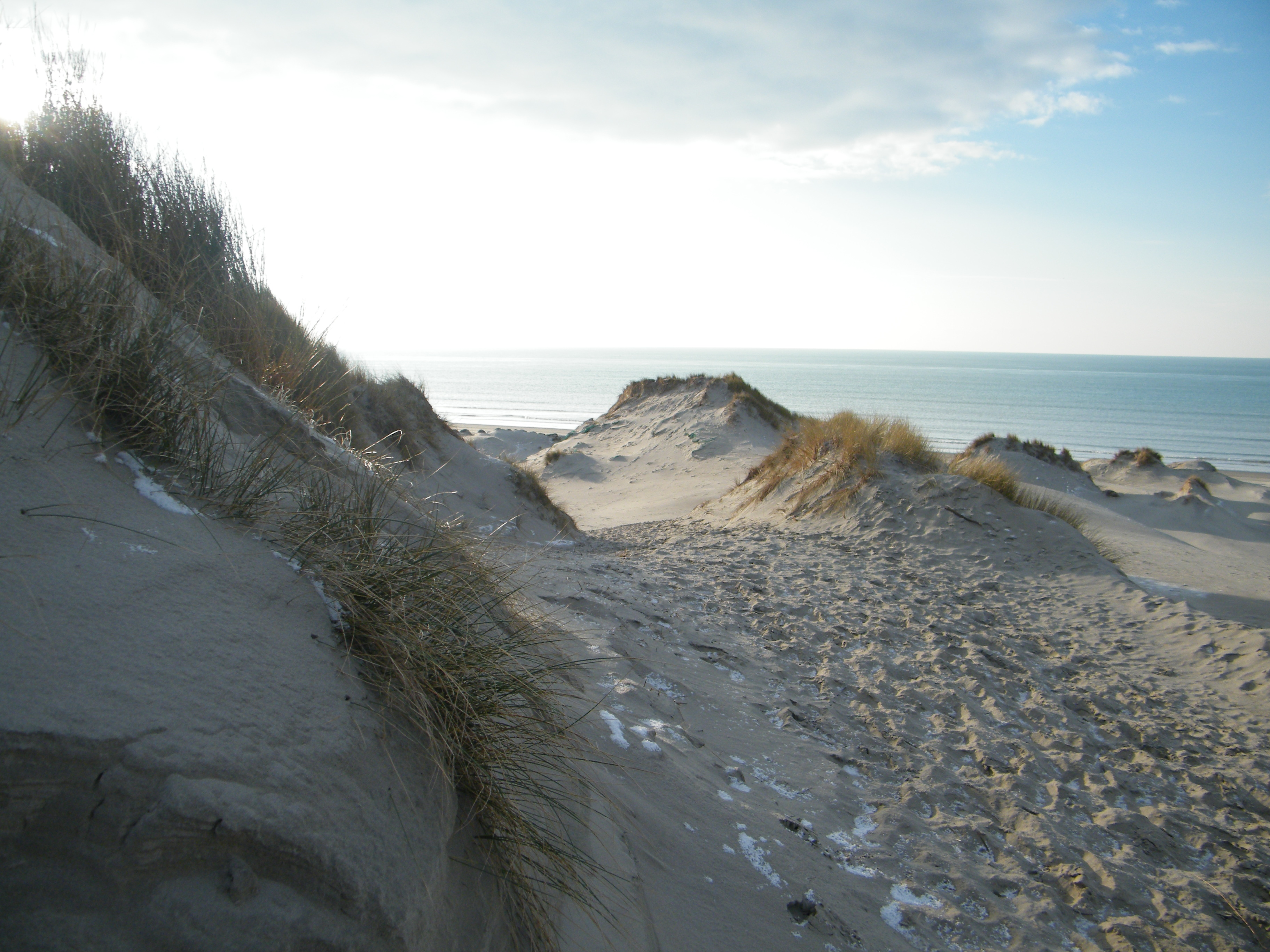 Saint-Quentin-en-Tourmont, Some, Fr, la crête des dunes est façonnée en crocs.